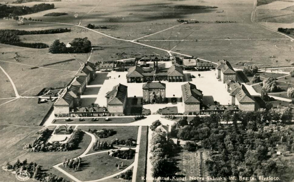 Vy över Norra skånska infanteriregementets (från 1963 Norra skånska regementet) kaserner Näsby, Kristianstad.